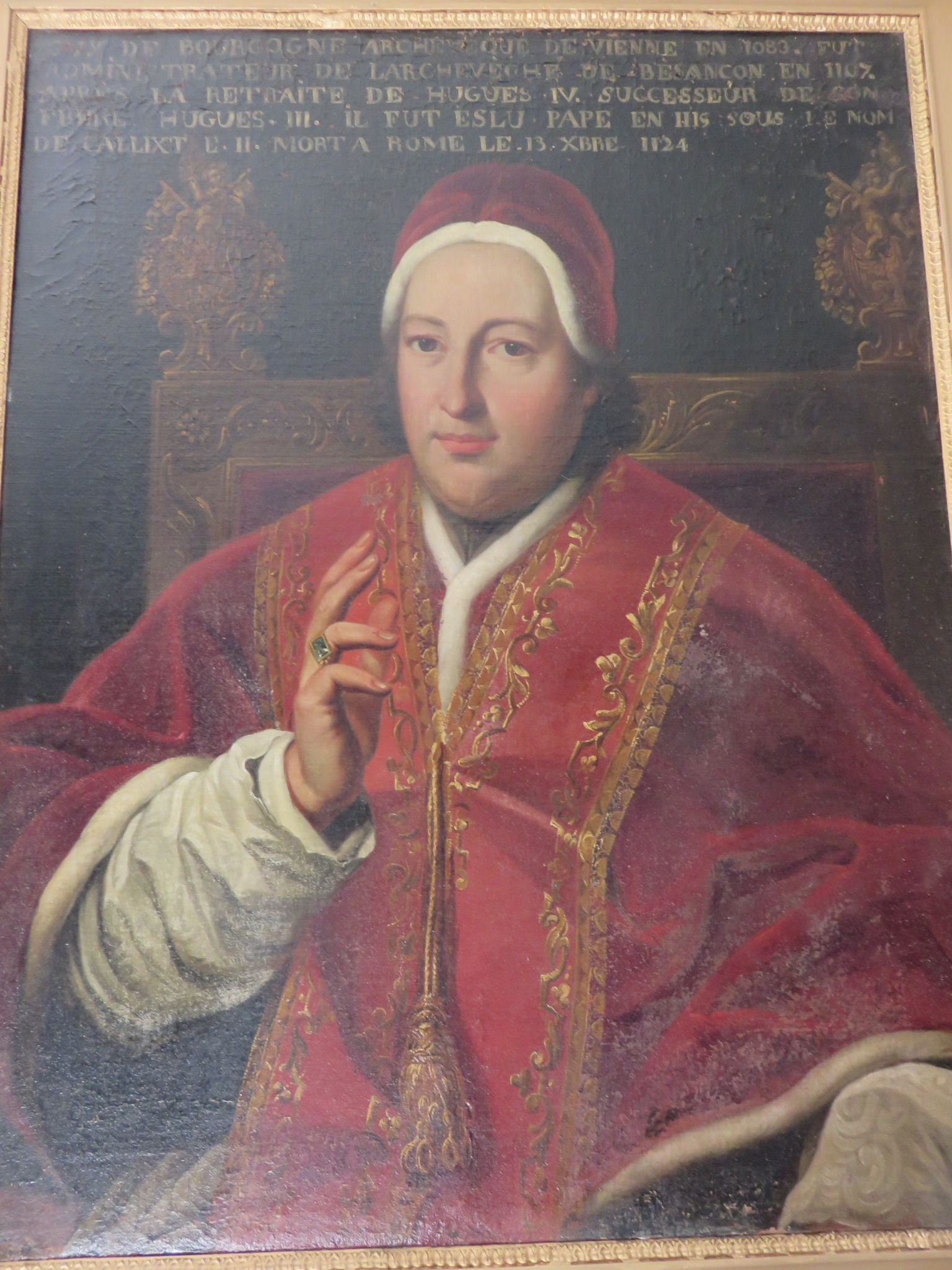 Portrait du pape Callistus II, à la mairie de Quingey, ville de sa naissance